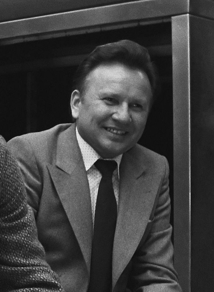 Aankomst van het Pools voetbalelftal op Schiphol voor de interlandwedstrijd tegen Nederland: trainer Kulesza.